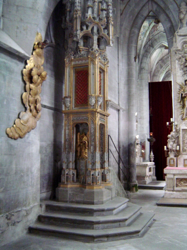 Salemer Münster